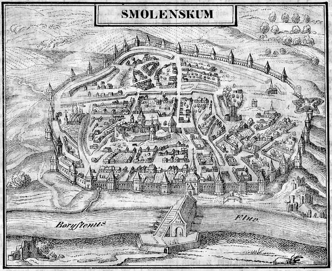 Беларуская (тарашкевіца): Смаленск (Smalensk). Плян места